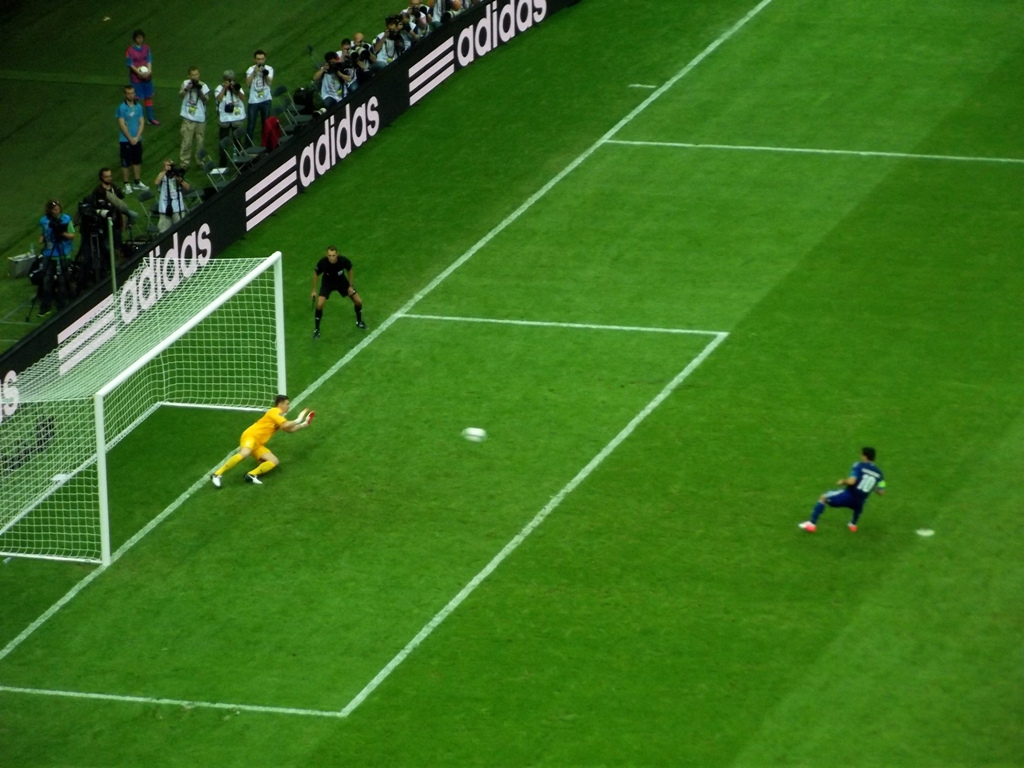 Zdjęcie zrobione w pierwszym dniu UEFA Euro 2012 w Warszawie, dniu otwarcia turnieju i meczu Polska-Grecja.